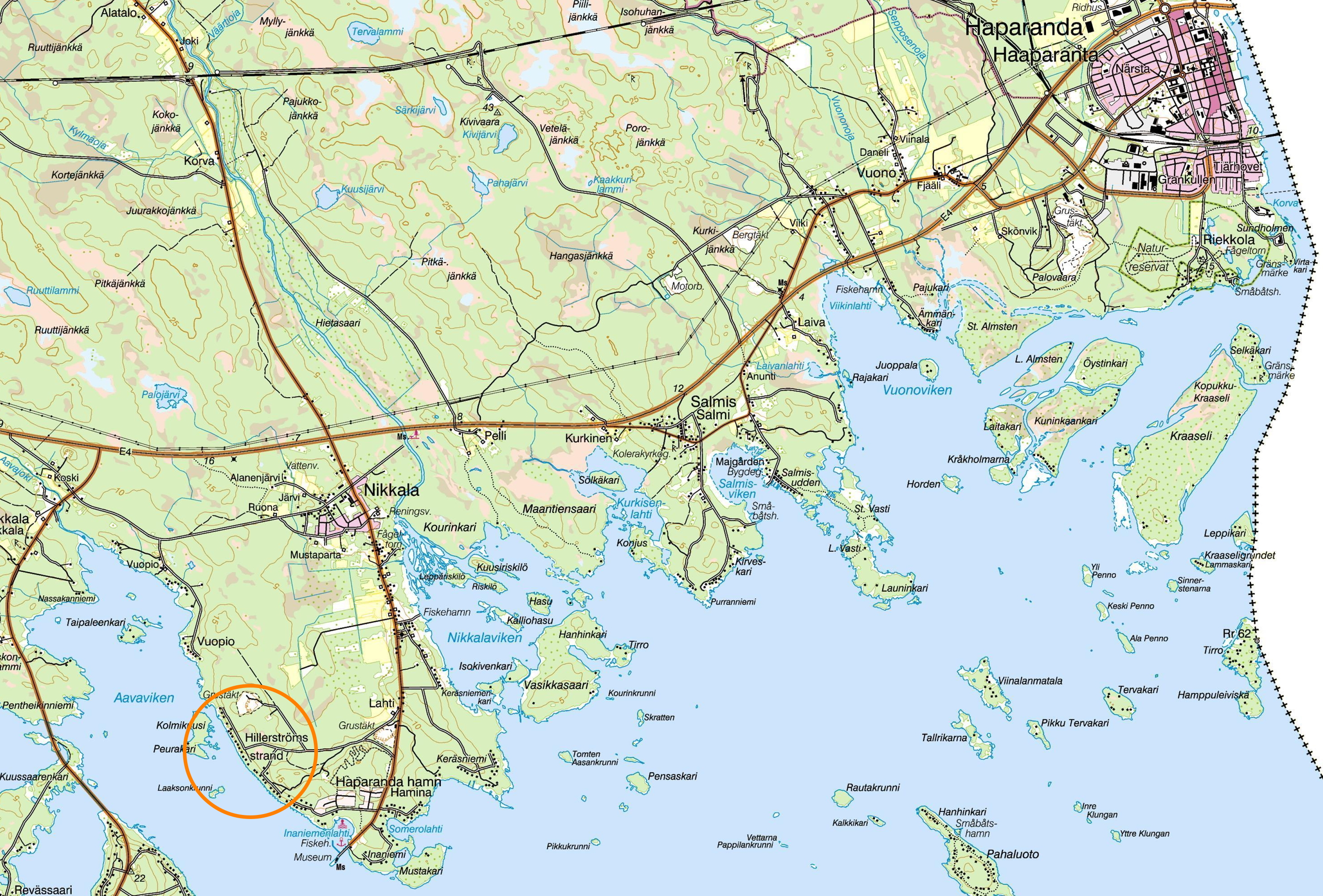 delar av Haparanda kommun, med orange ring runt platsen för Carl Johans stad (Karl Johans stad). 740 Haparanda. Kartdata: Lantmäteriet, licens CC BY.